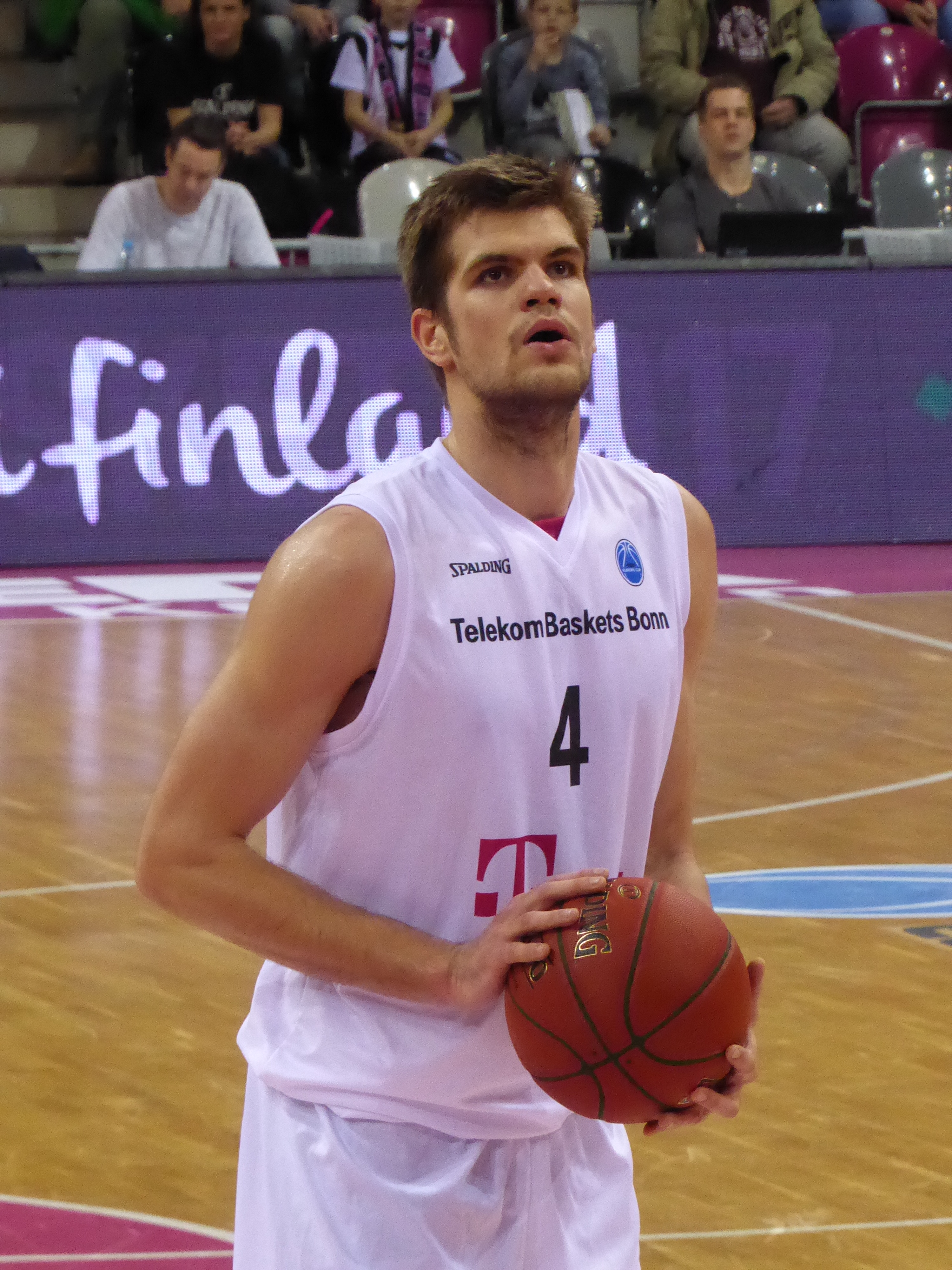 Ojārs Siliņš beim Spiel der Telekom Baskets Bonn gegen APOEL Nicosia am 14. Dezember 2016.